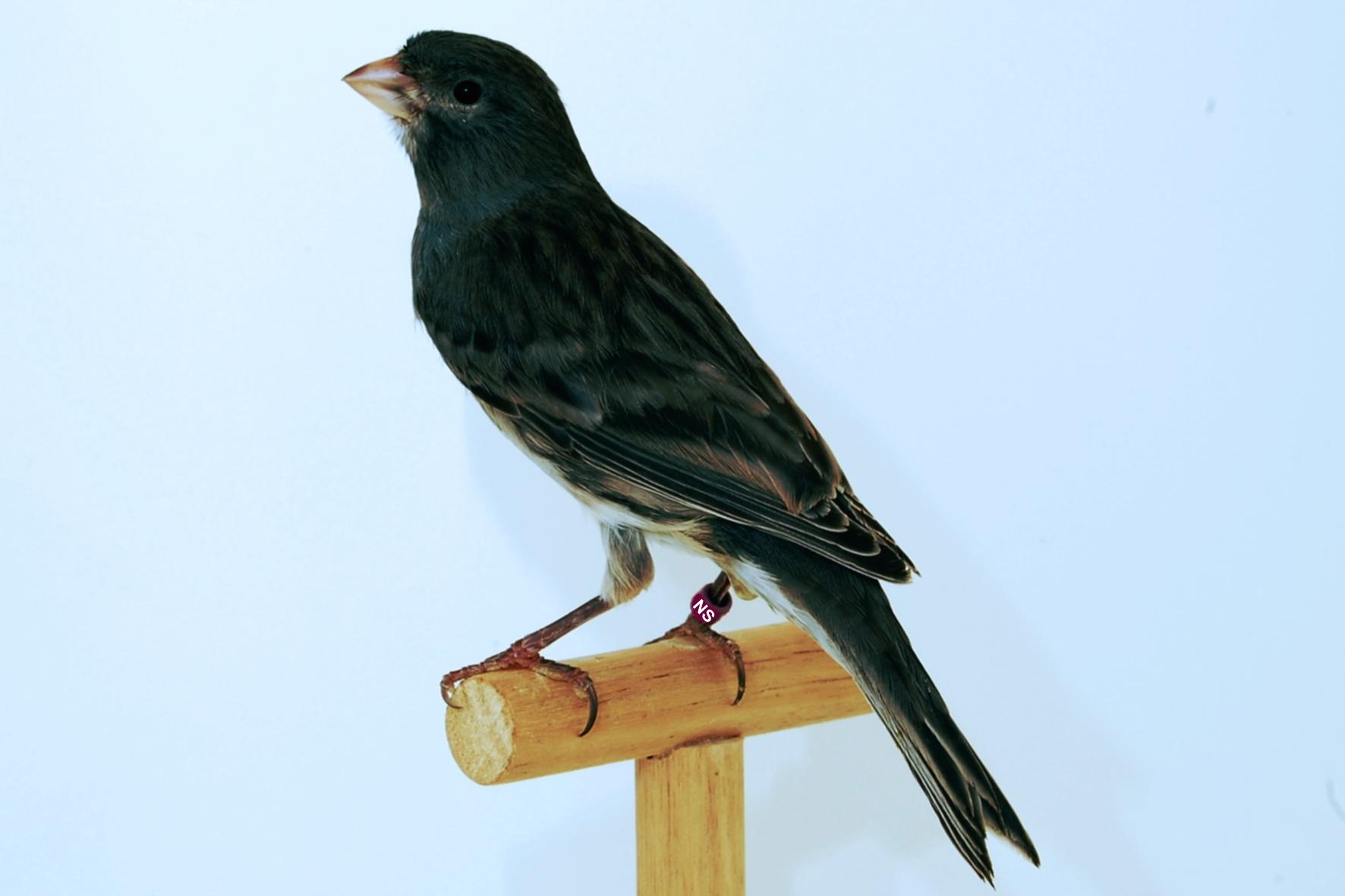 Farbenkanarie Schwarz Onyx Weiß